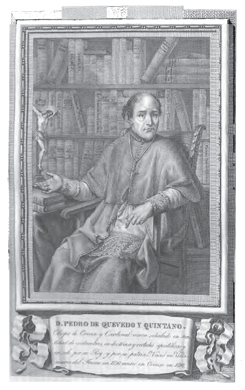 Retrato de Pedro de Quevedo y Quintano.